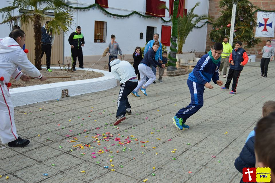 El pelotero de Arquillos dando un "alpargatazo"